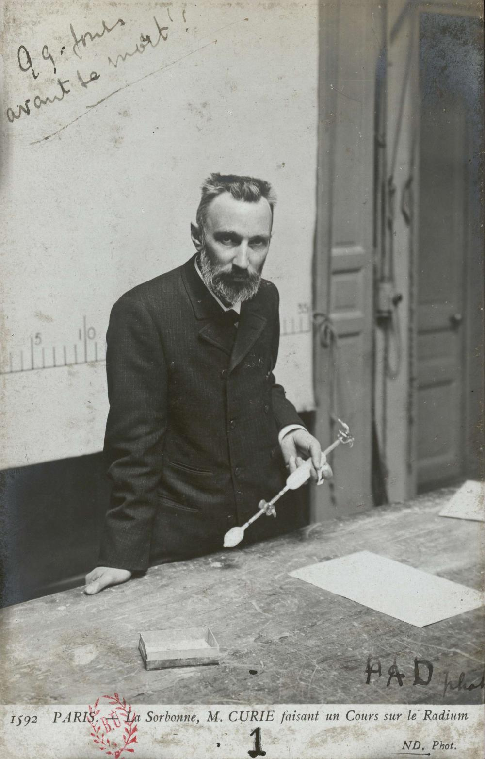 Carte postale